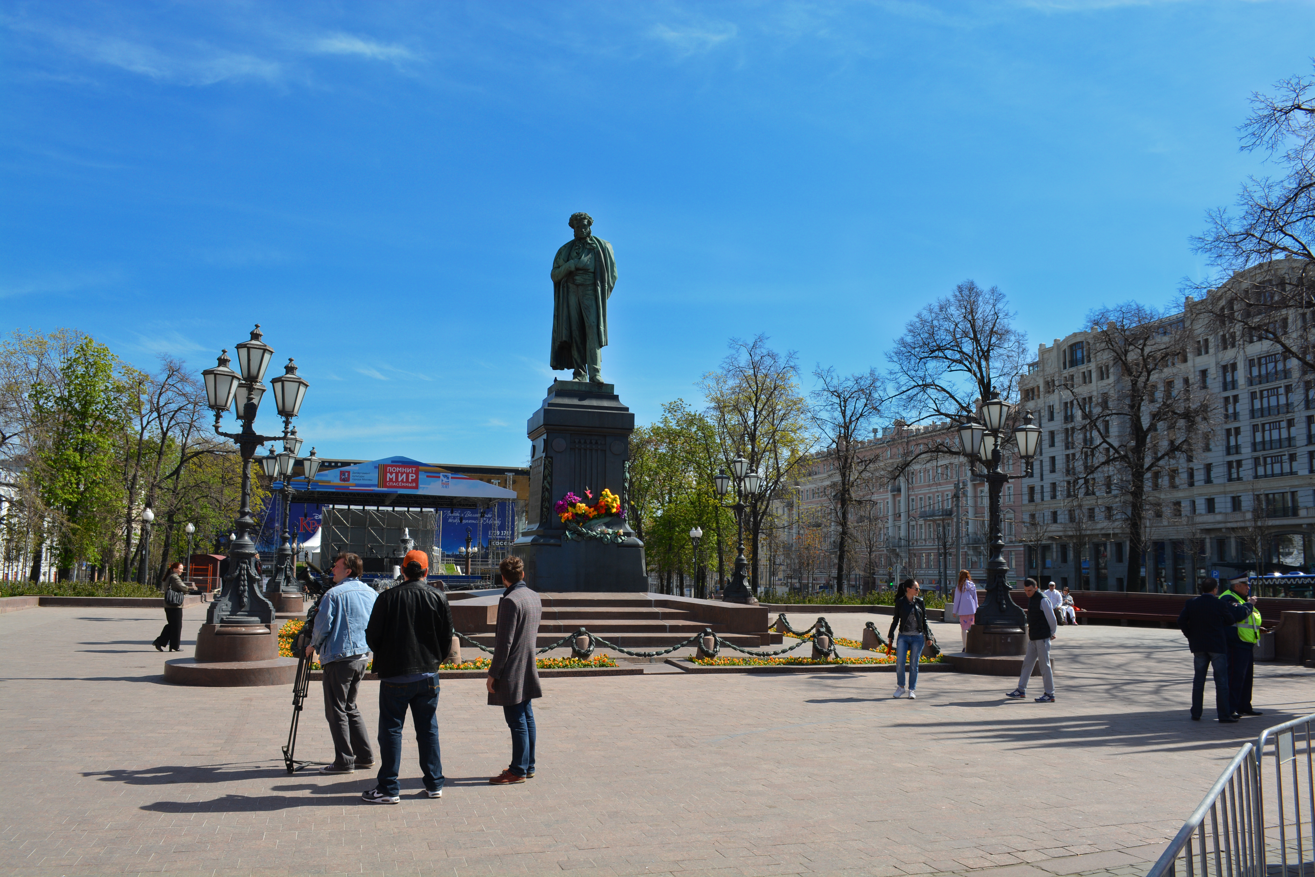 Plaza Pushkinskaya de Moscú.